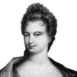 Mme de Tencin : écrivain français et salonnière (Claudine Guérin de Tencin, 1682-1749)